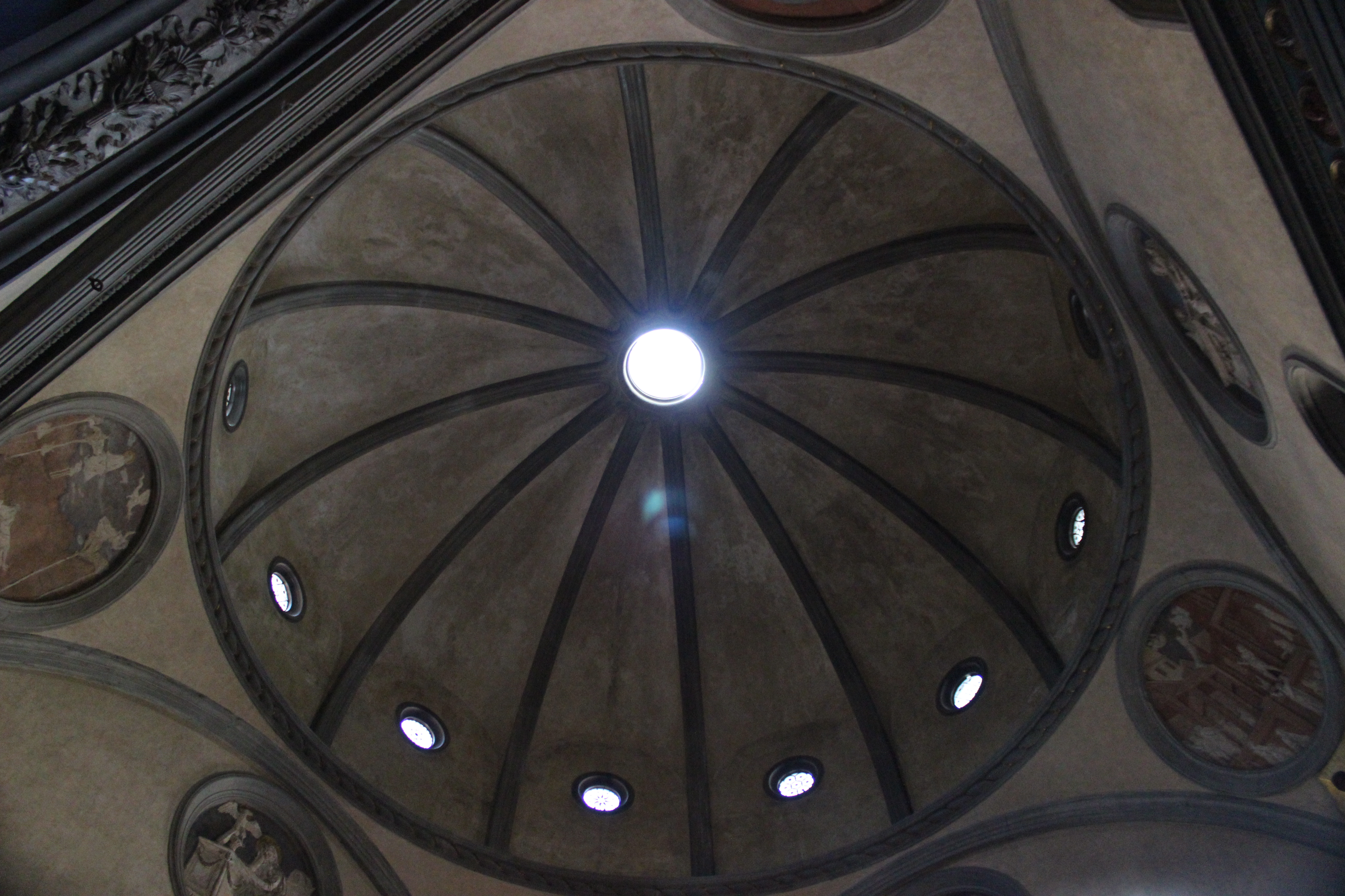 Florencia. San Lorenzo, Sagrestia Vecchia. Brunelleschi.